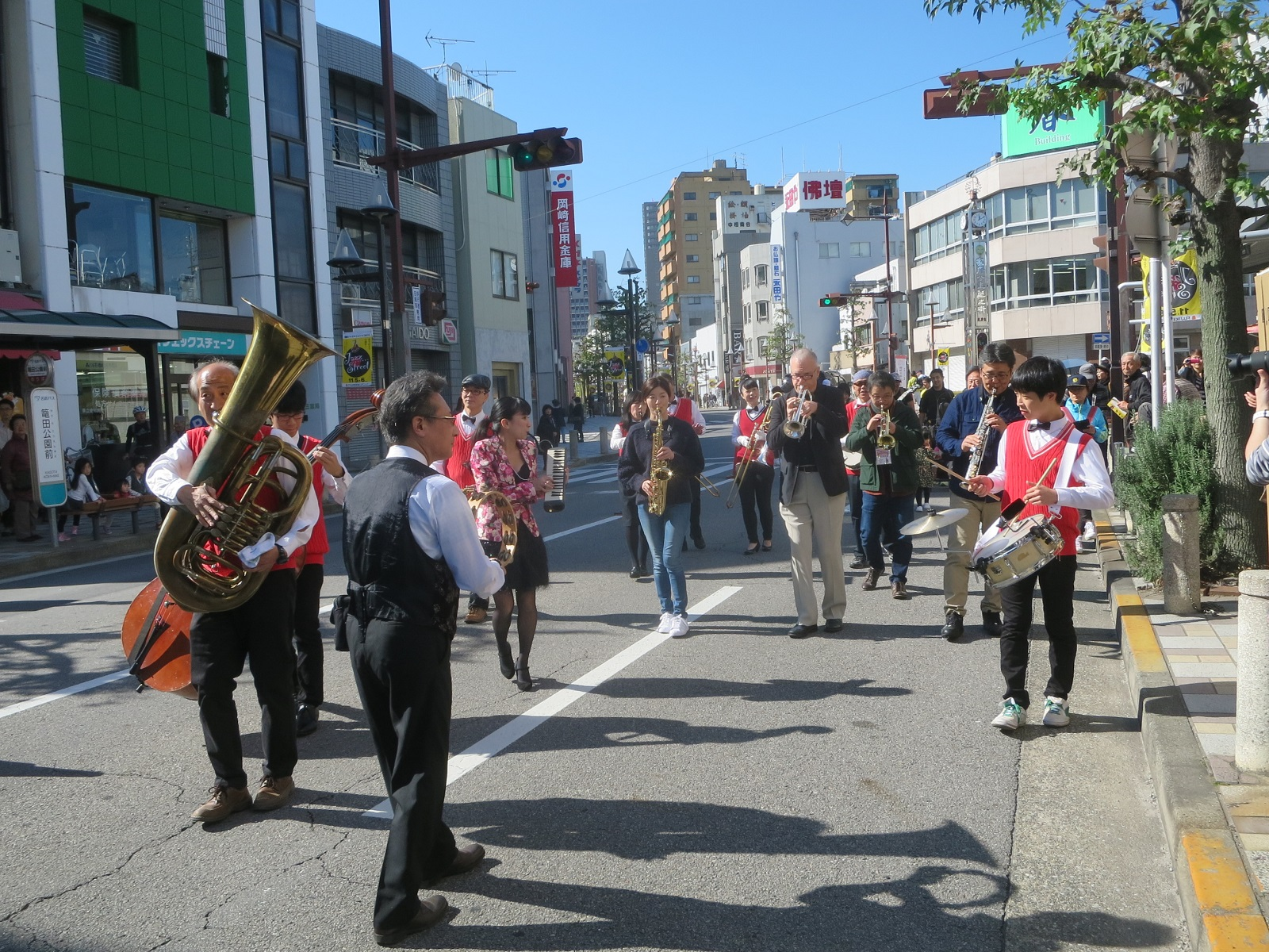 岡崎ジャズストリート2016（愛知県岡崎市）